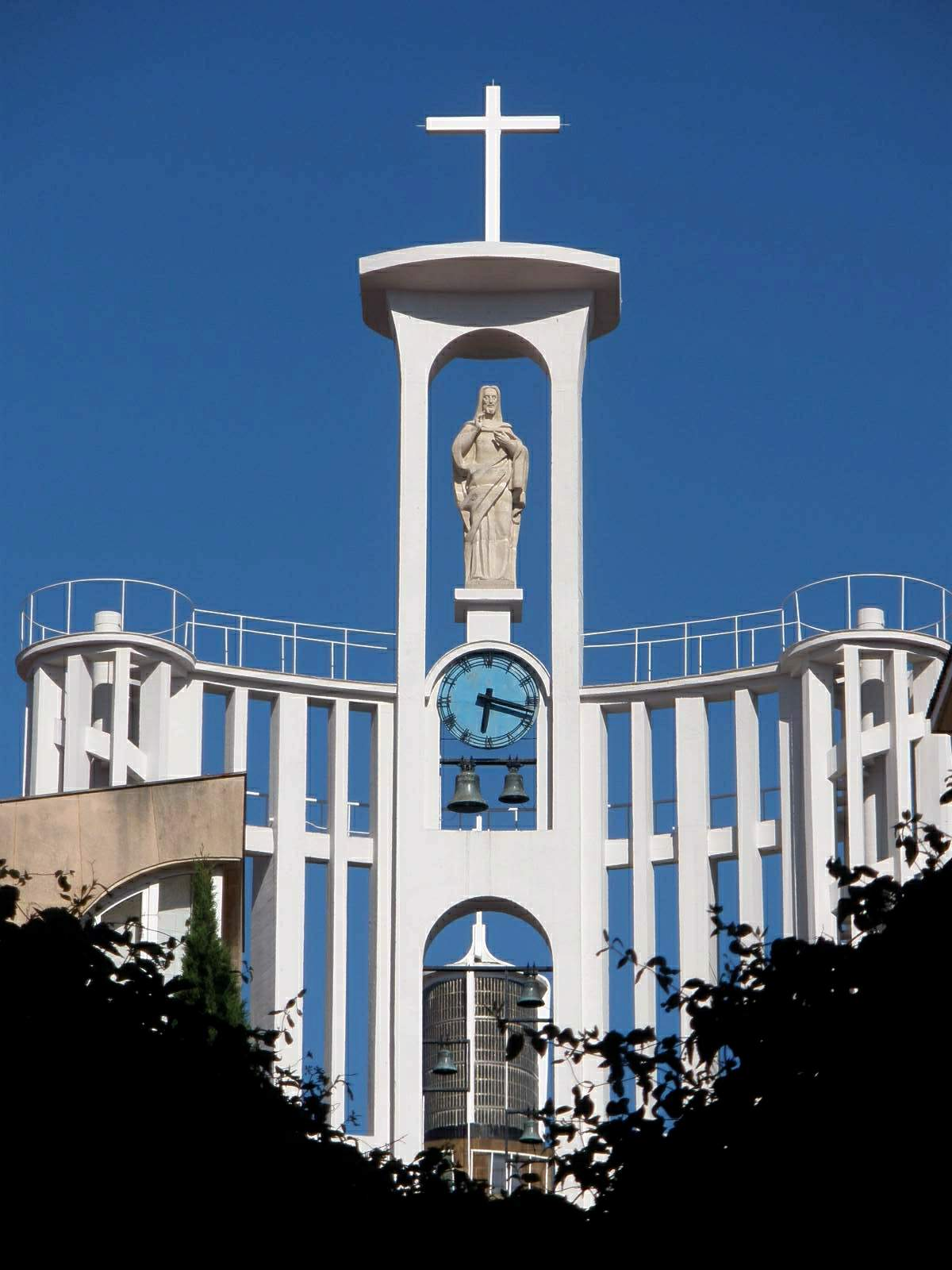 Iglesia de la Virgen Grande (Torrelavega)